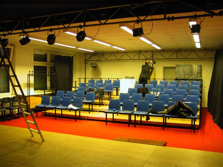 Der Theaterraum, fotografiert von der Bühne